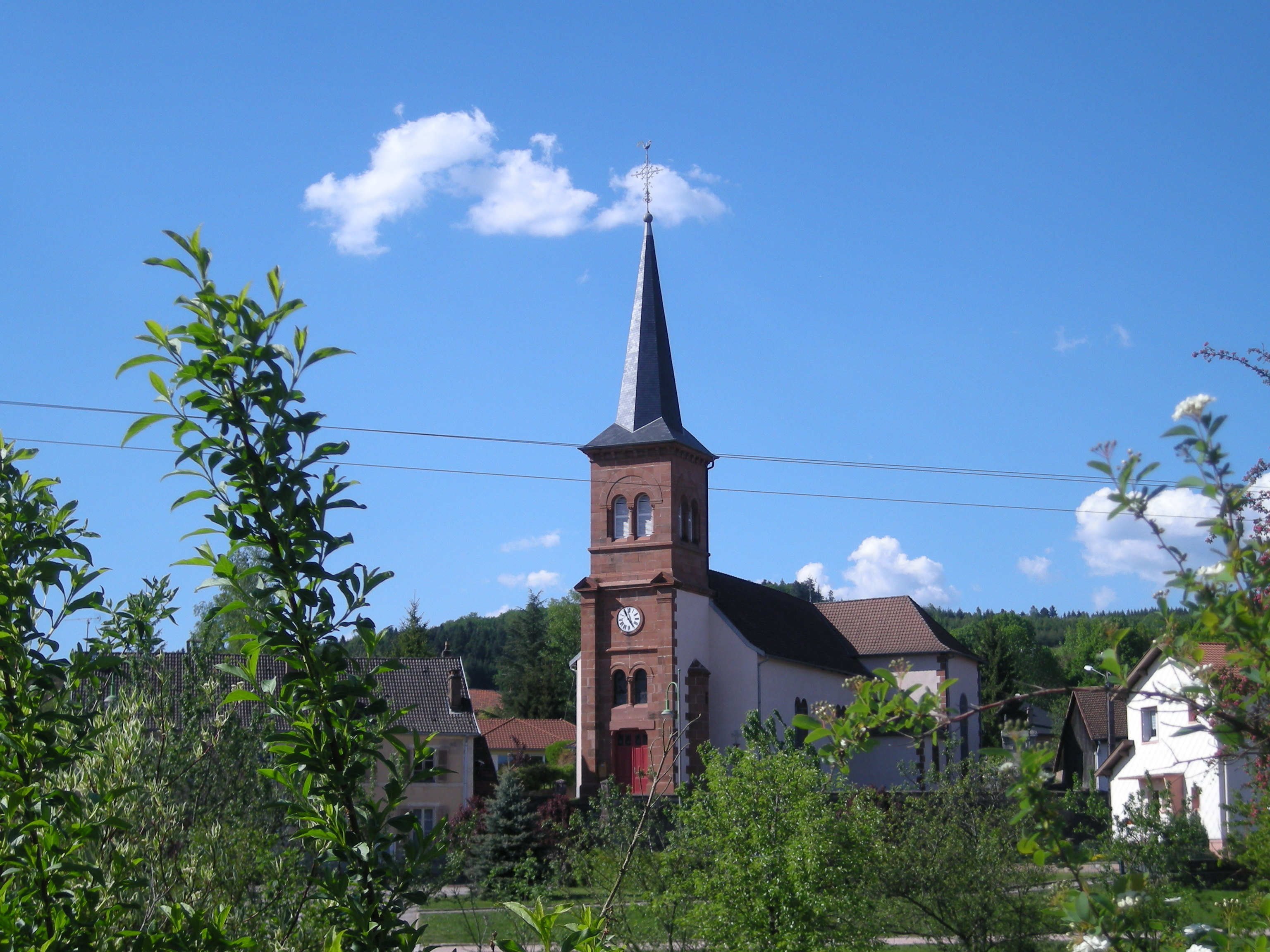 L'église Saint-Étienne-et-Saint-Gengoult d'Hurbache (Vosges)